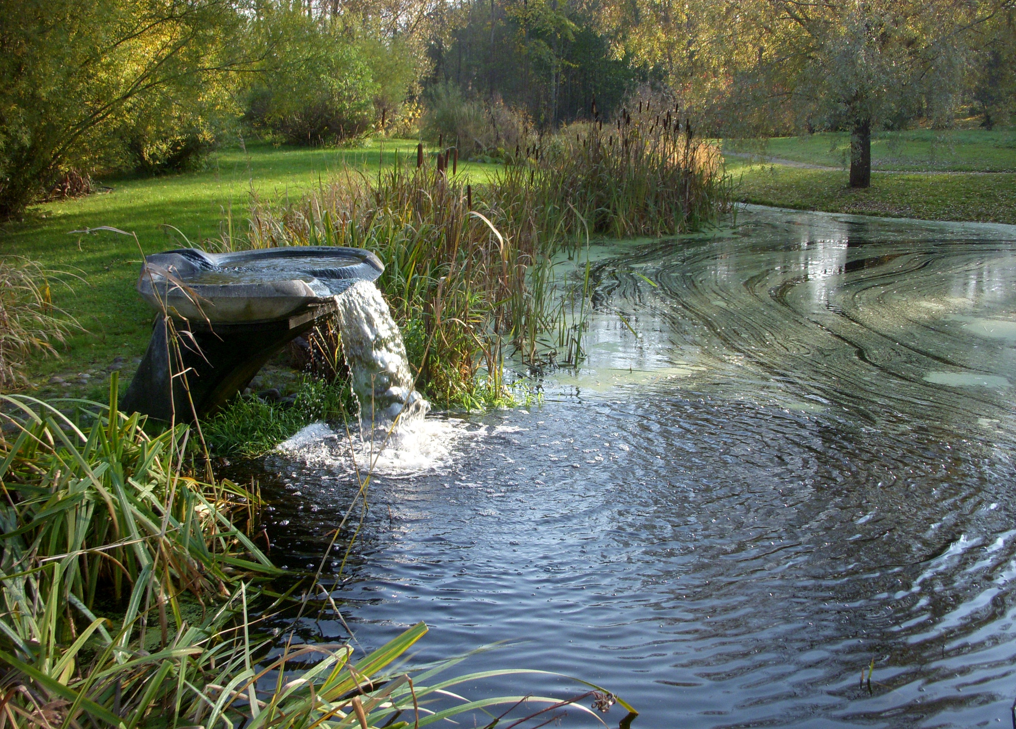 Tullgarns biologiska dammar, avloppsreningsverket